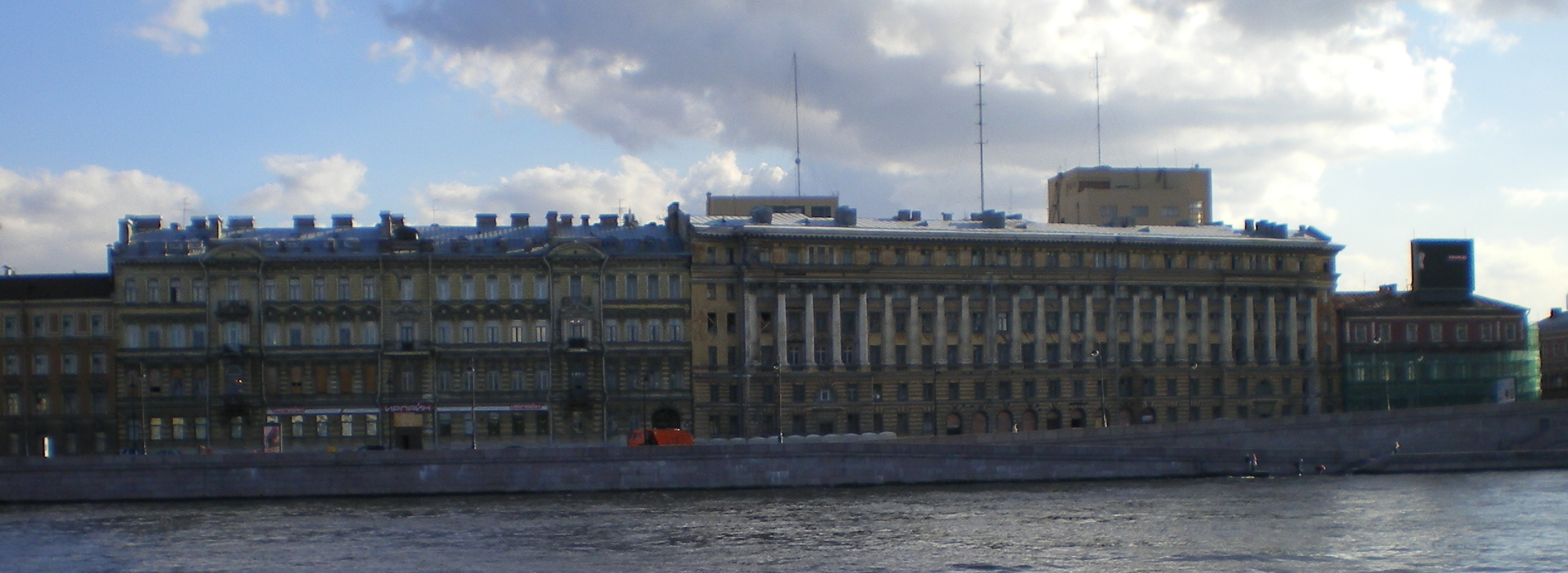 Набережная Робеспьера дома 30-34, вид с Невы